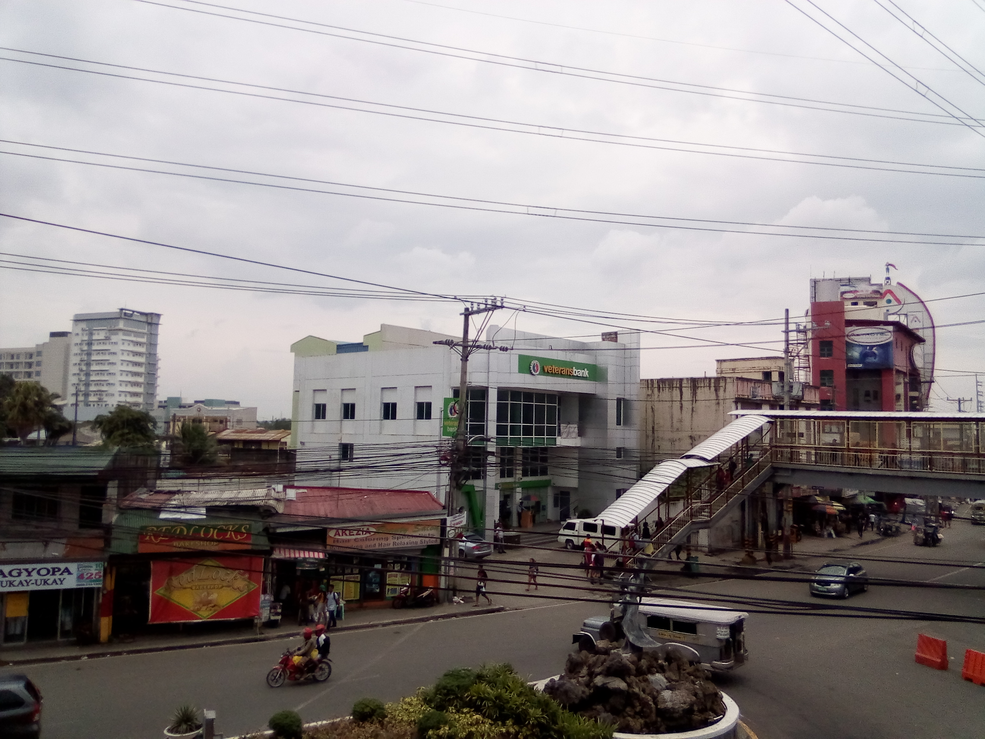 Tagalog: Ang Lungsod ng Calamba sa Laguna noong ika Agosto 2018